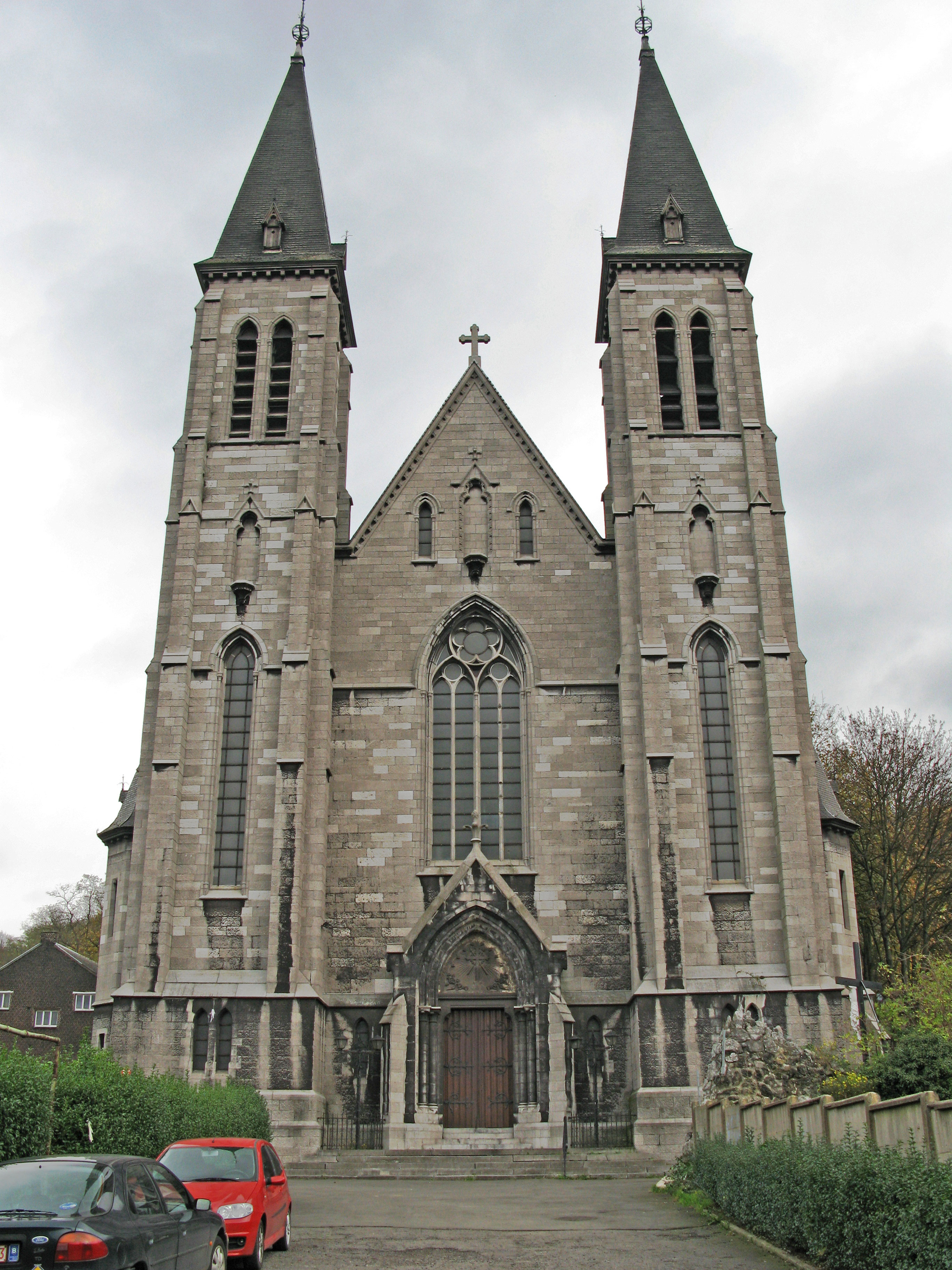 Kierch Saint Lambert vu Grivegnée. Kategorie:Kierchen an der Belsch